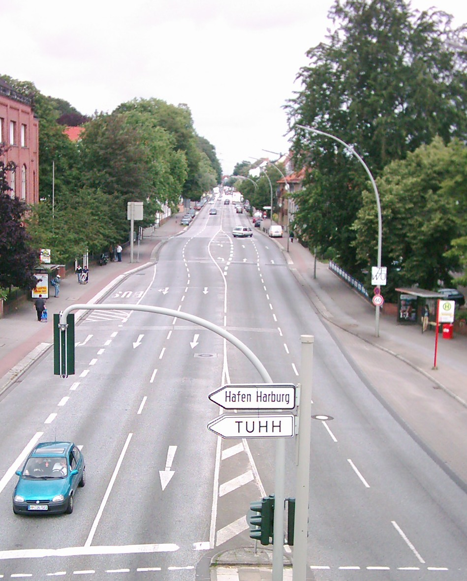 Bundesstraße 73, Buxtehuder Straße, in Hamburg-Harburg. Blick von der Seehafenbrücke in Fahrtrichtung Cuxhaven. Links im Bild das Amtsgericht Hamburg-Harburg.